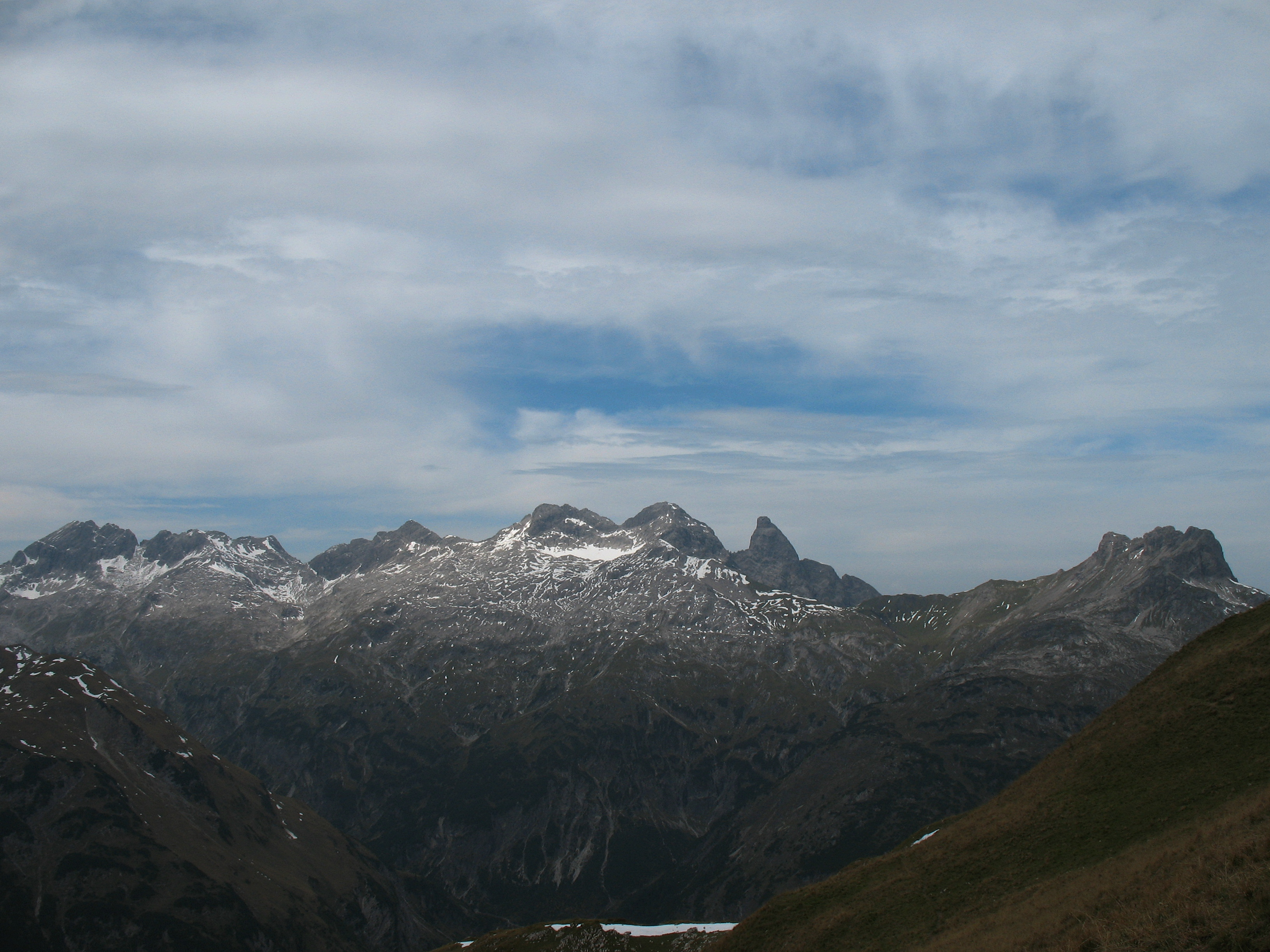 Blick von der Jöchelspitze (2226 m) nach Norden auf die Hauptgipfel des Zentralen Allgäuer Hauptkamms: Hohes Licht (2651 m), Steinschartenkopf (2615 m), Bockkarkopf (2609 m), Hochfrottspitze (2649 m), Mädelegabel (2645 m), Trettachspitze (2595 m) und Kratzer (2428 m). Unter der Mädelegabel befindet sich der Schwarzmilzferner.